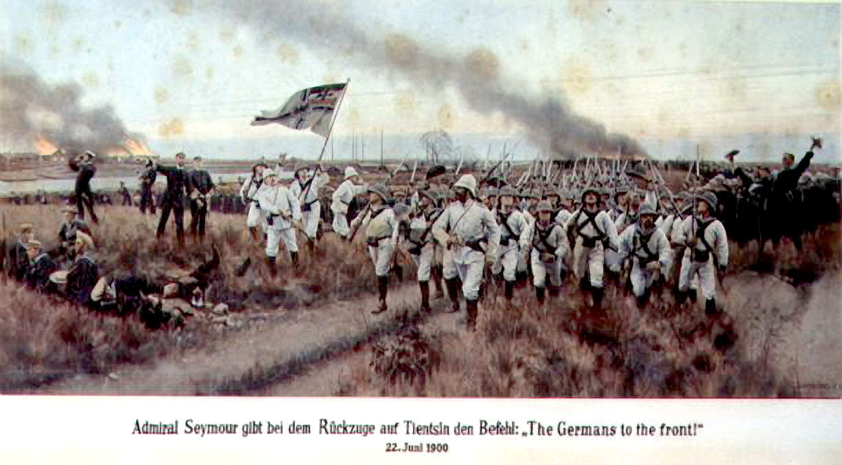 Zeitgen. Postkarte zum Boxeraufstand. Mehrfarbiger Lichtdruck nach einem Gemälde von C. Röchling. Bildgröße: 24 x 50 cm. Blattgröße: ca. 45 x 67 cm. Admiral Seymour gibt bei dem Rückzuge auf Tientsin den Befehl: "The Germans to the front!" 22. Juni 1900 "Die Seymour-Expedition befand sich derweil auf dem Rückzug nach Tientsin und lief Gefahr, aufgerieben zu werden. Die Zahl der Verluste war hoch. In dieser für die alliierten Soldaten seit langem erstmals kritischen Situation ist es am 22. Juni 1900 vor der Erstürmung eines Arsenals zu der in Deutschland später mythisierten Äußerung Seymours »The Germans to the Front« gekommen. Das gleichbetitelte Gemälde von Carl Röchling, das deutsche Soldaten kampfesmutig in China zeigt, galt als Ikone deutscher Historienmalerei zur Kolonialgeschichte und fand in unzähligen Nachbildungen und Abdrucken weite Verbreitung." (Tsingtau, Ausstellung im Deutschen Historischen Museum vom 27. März bis 19. Juli 1998, Katalog).